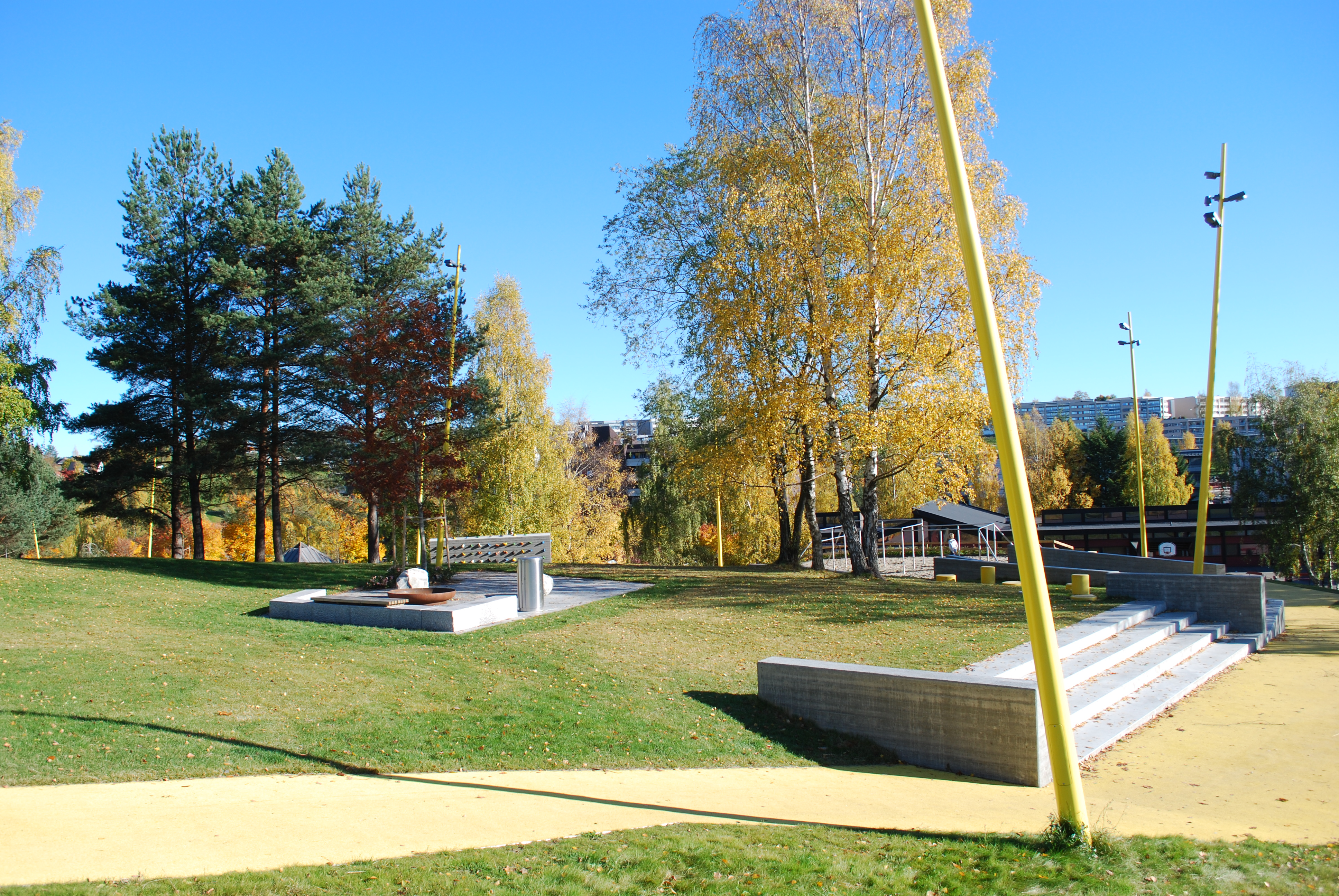 Verdensparken, Furuset, Oslo. Sitteområde midt i parken